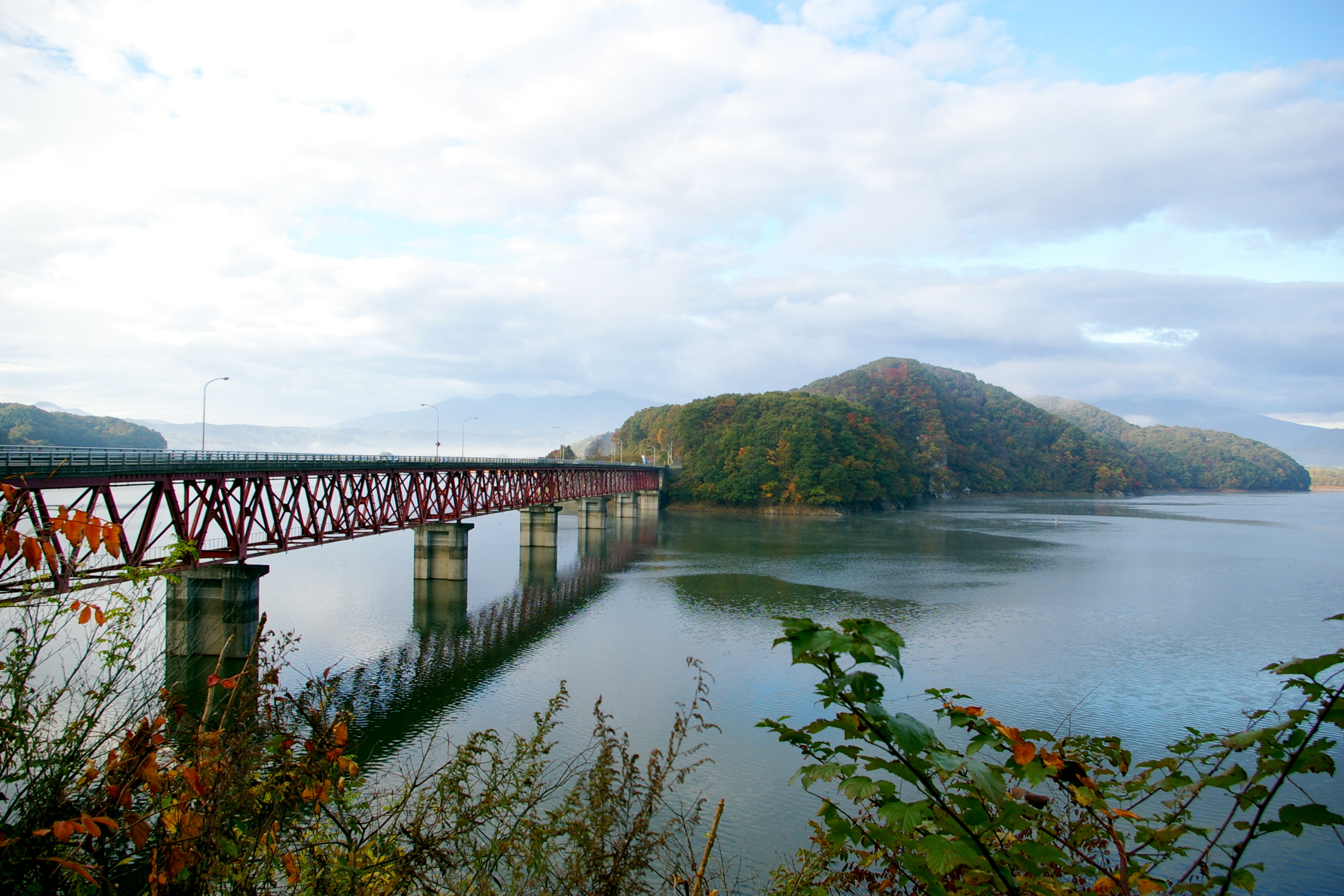 Kamafusa lake, Miyagi